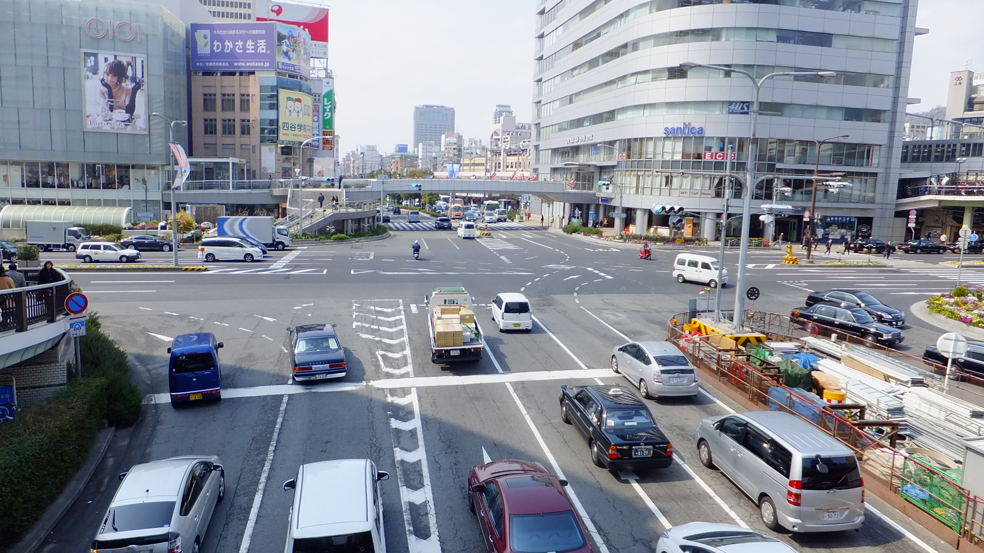 兵庫県神戸市中央区雲井通8丁目 兵庫県道21号神戸明石線